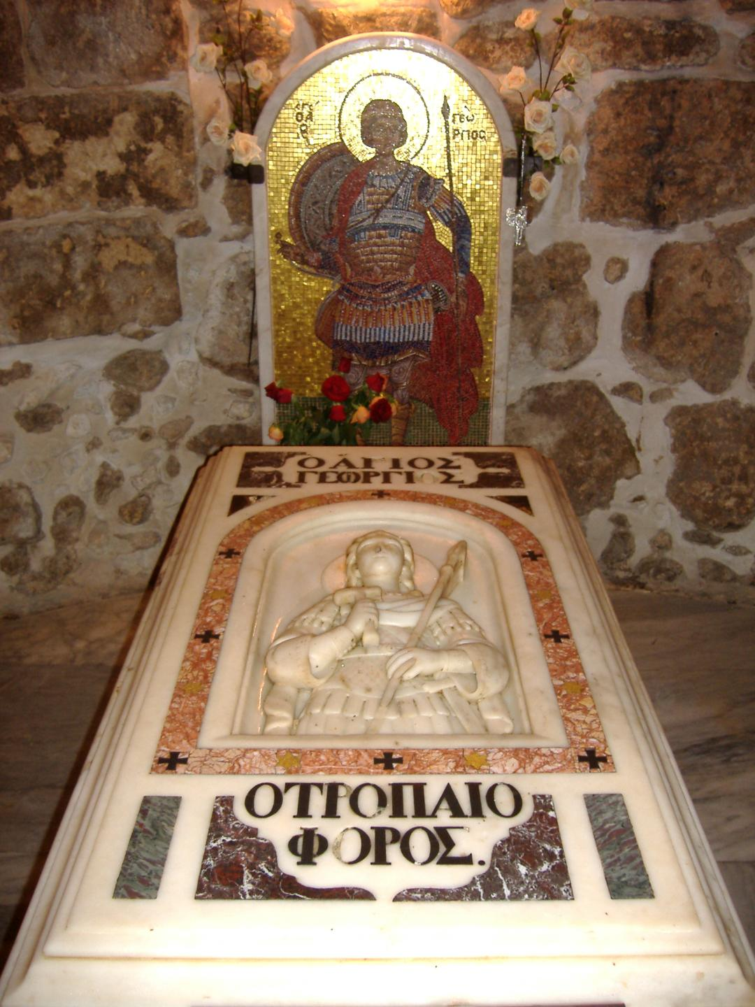 La tomba di San Giorgio (Lod, Israele) - Saint George tomb